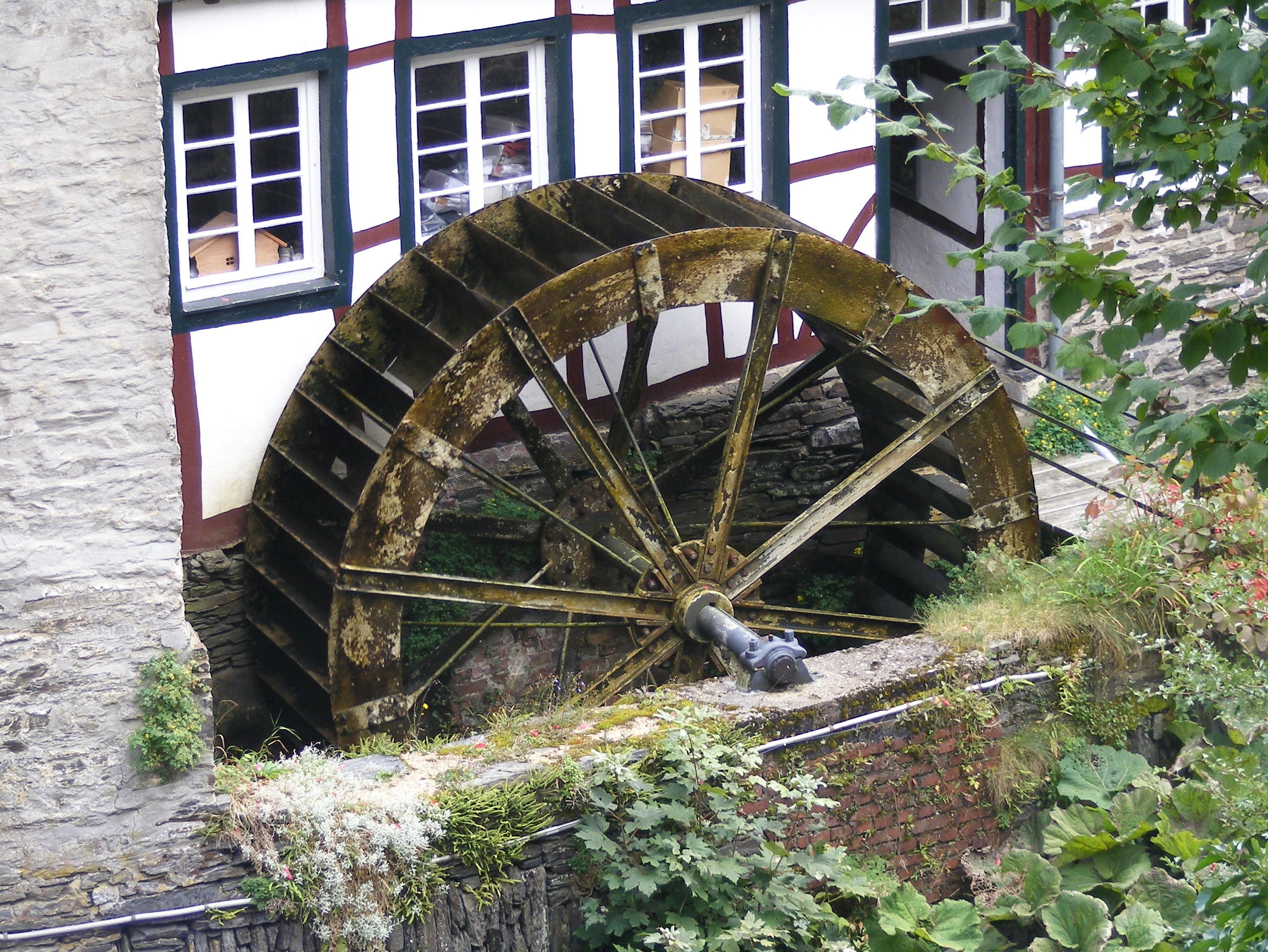 Monschau Rurstraße 10 Rückseite MühlradThis is a photograph of an architectural monument., no. 58